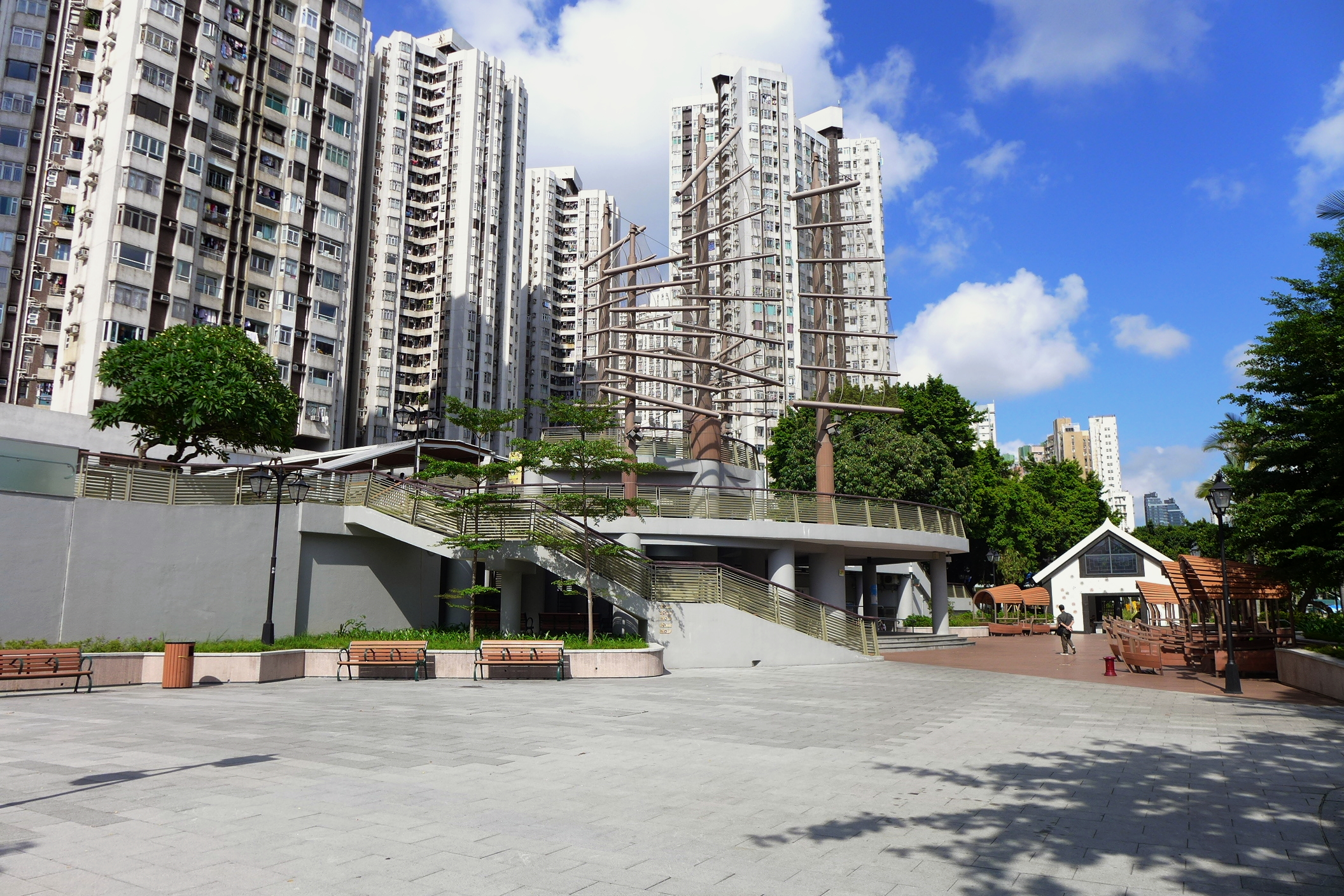 Aberdeen Promenade